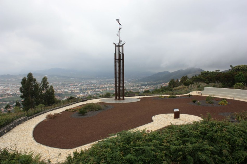 Fotografía del monumento Conmemorativo Internacional 27 de marzo de 1977 el cual esta erigido en memoria de el trágico accidente de los rodeos